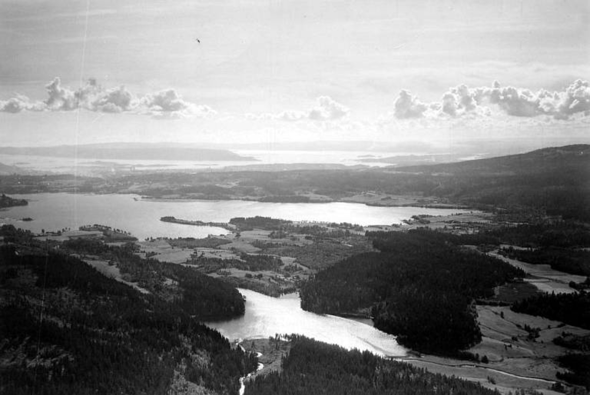 Dausjøen i forgrunnen og Maridalsvannet i bakgrunnen. Foto: Widerøe/Vilhelm Skappel, ca. 1953. Fra Oslo byarkivs samling i Digitalt museum.